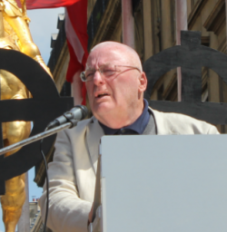 Pierre-Vial